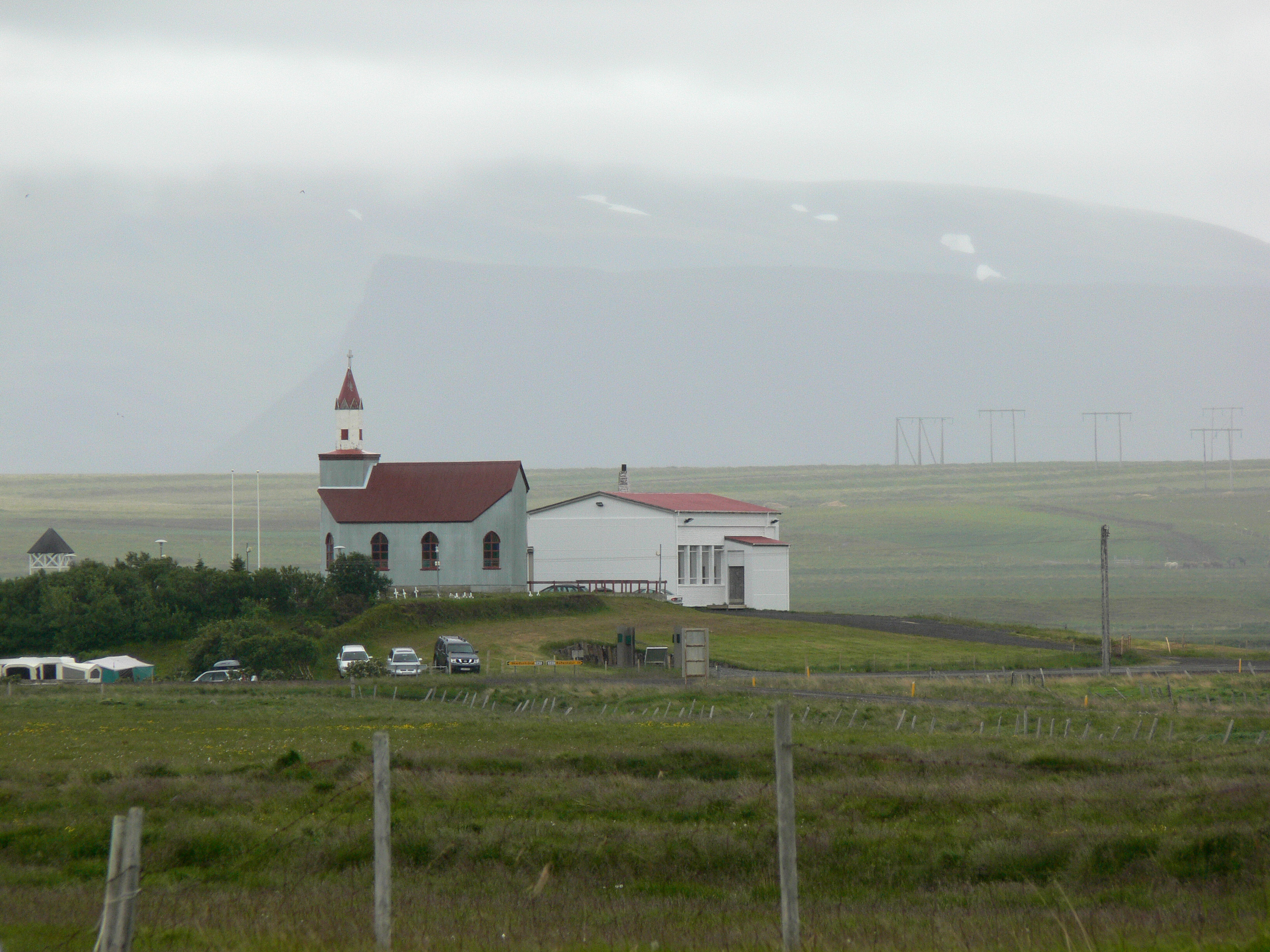 Staðarhólskirkja in Staðarhólsdalur (Saurbær)